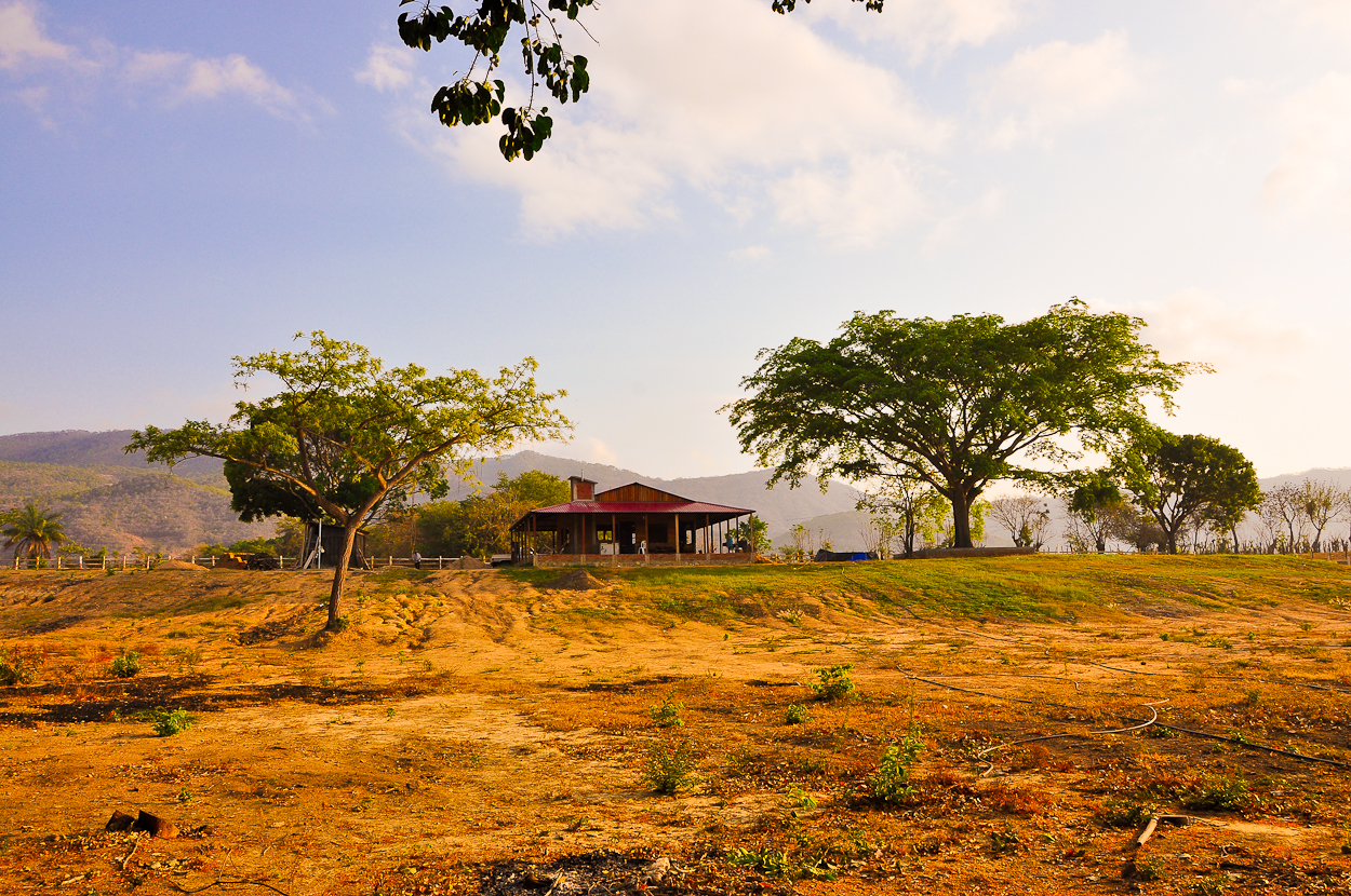 En el ejido Cuauhtémoc (28)